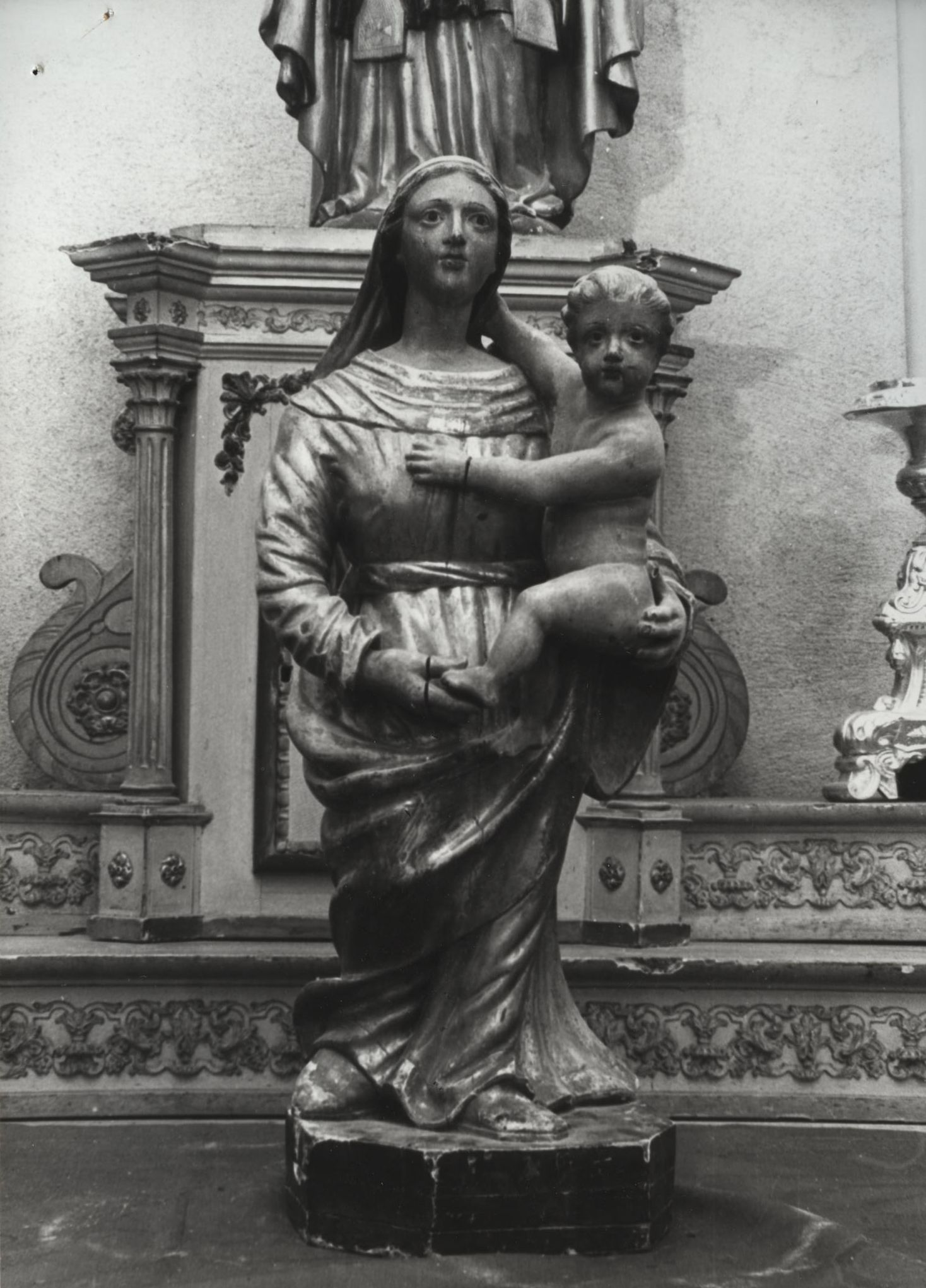 Skulptur Madonna und Kind in der Kirche Sainte-Croix in Gannat